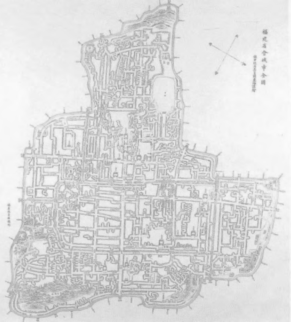 中文（香港）: 《福建省會城市全圖》（福省陳良輔鐫刊）。